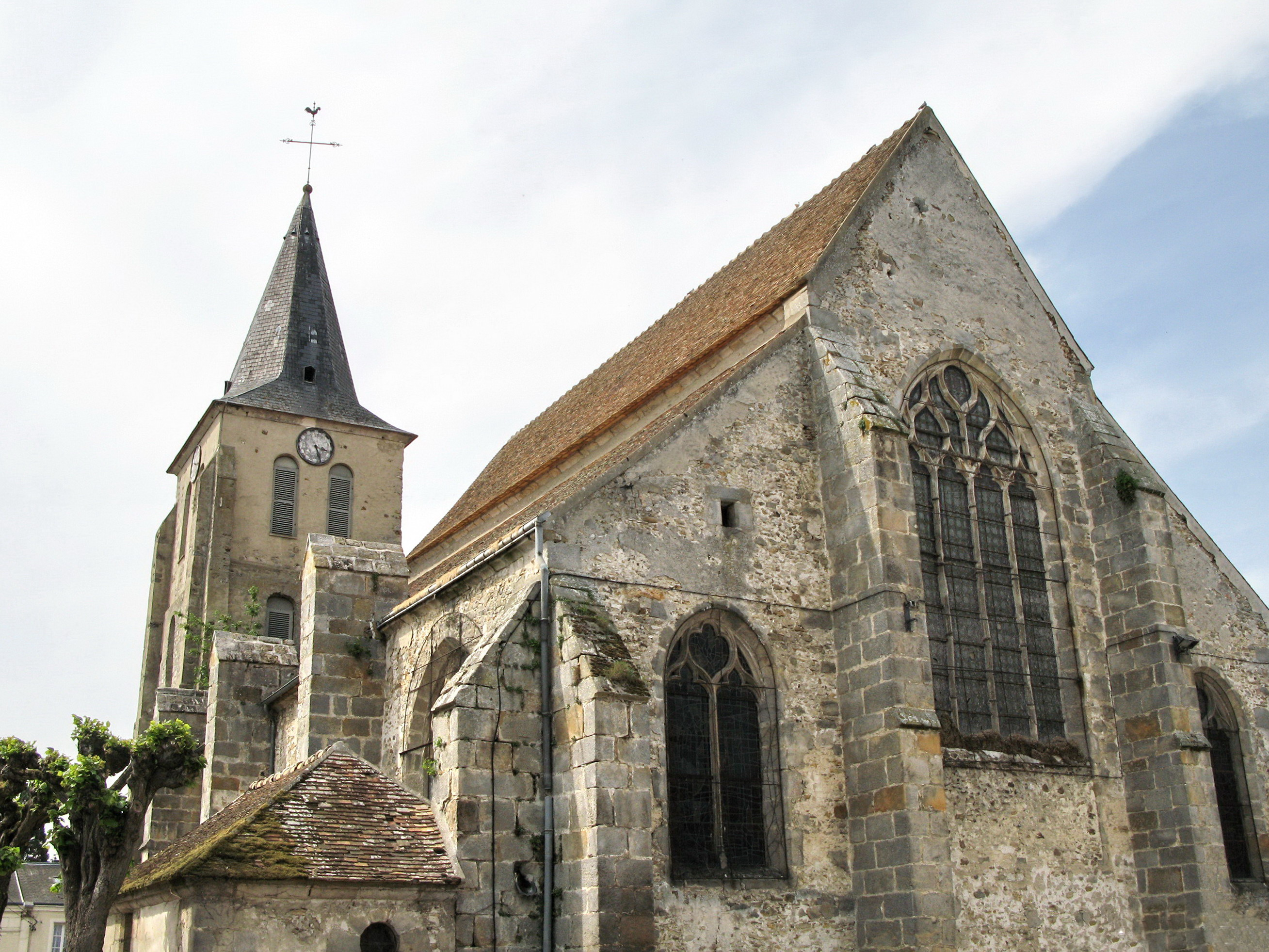 Vue de l'église du Val Saint-Germain, côté est (Essonne)